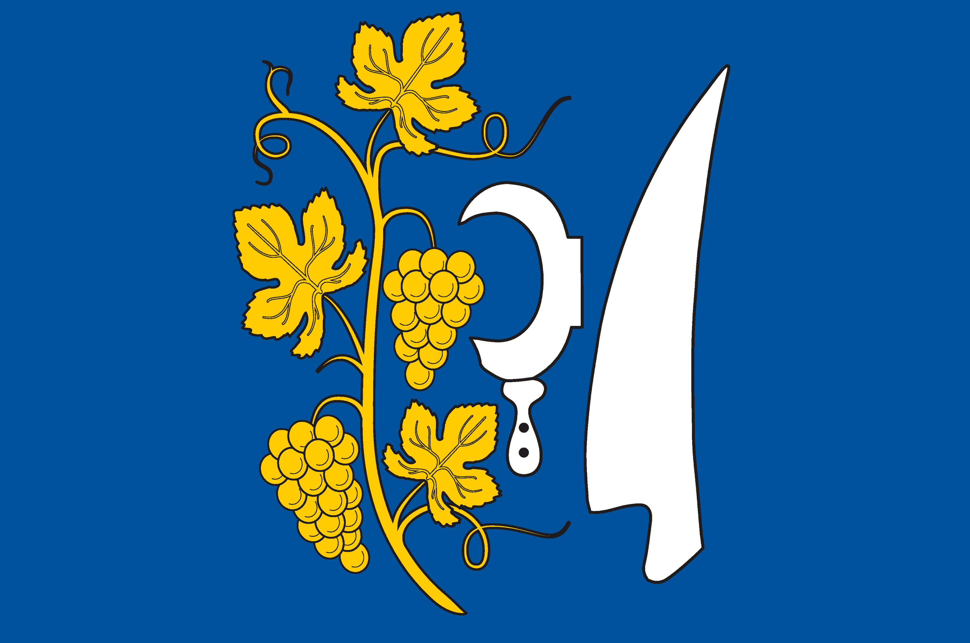 Vlajka obce Troubsko, okres Brno-venkov. V modrém štítě vpravo zlatý stonek vinné révy se dvěma hrozny a třemi listy, vlevo vedle sebe vinařský nůž a krojidlo, obojí stříbrné.